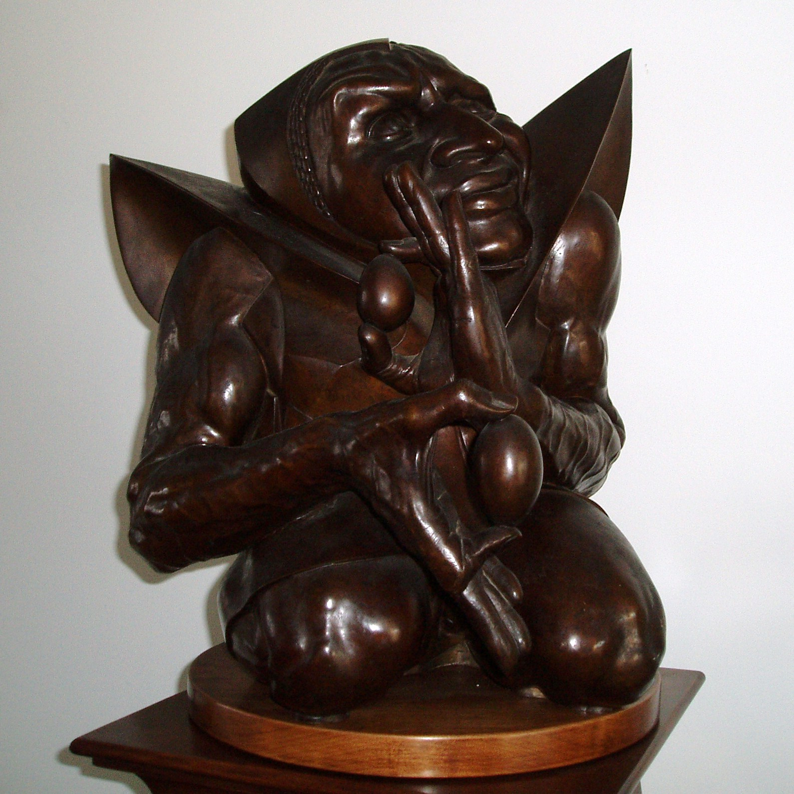 Le Fou du roi